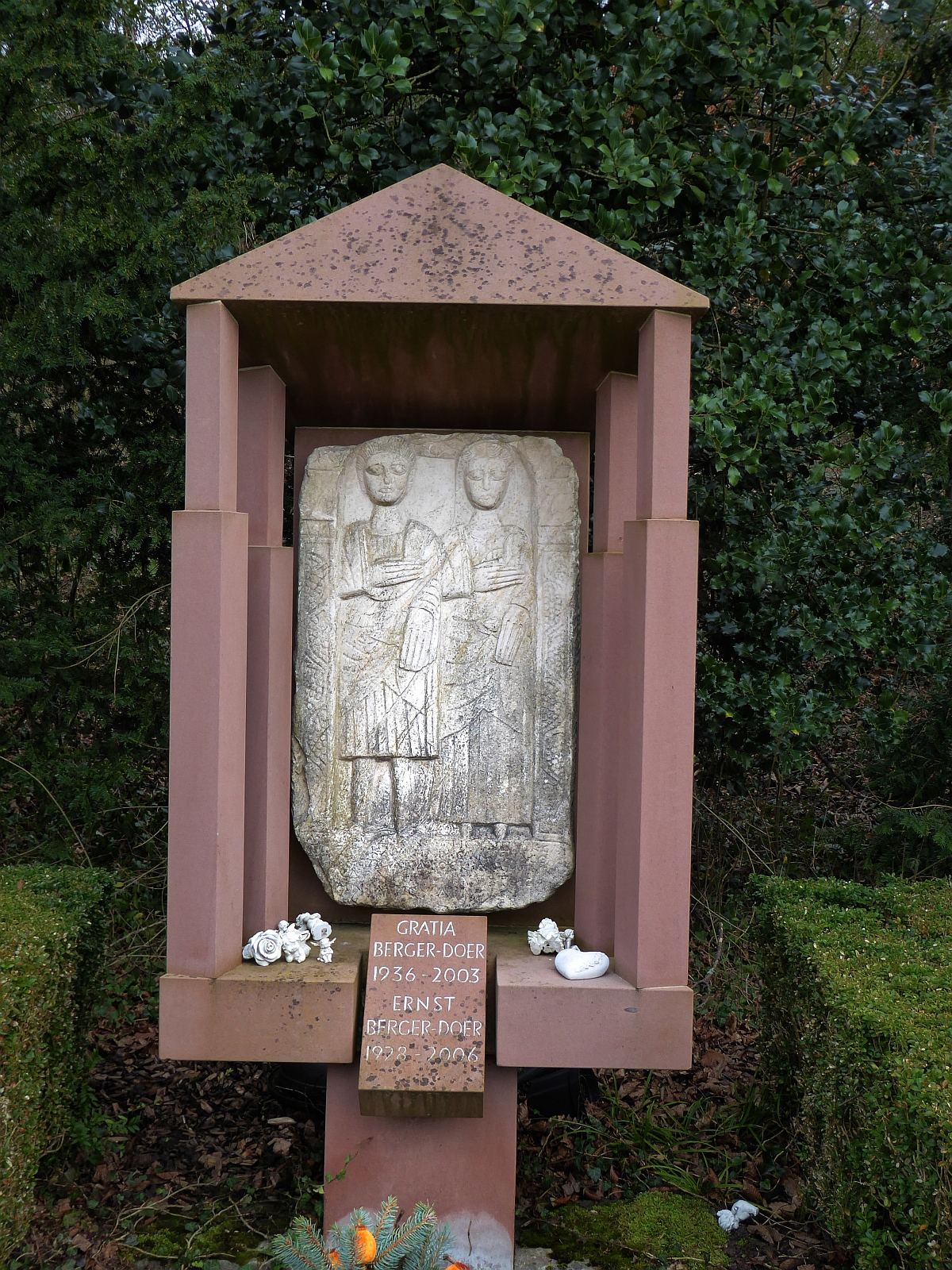 Ernst Berger-Doer (1928–2006), Archäologe, Mitbegründer und Direktor des Antikmuseums in Basel, a.o. Professor an der Universität Basel, Grab auf dem Friedhof Hörnli, Riehen, Basel-Stadt